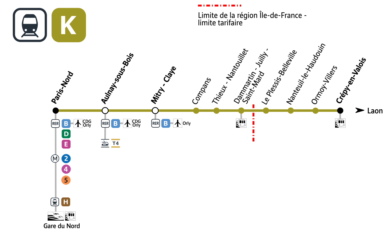 Plan schématique de la ligne K du Transilien avec indication des correspondances (RER, Transilien, autres trains).